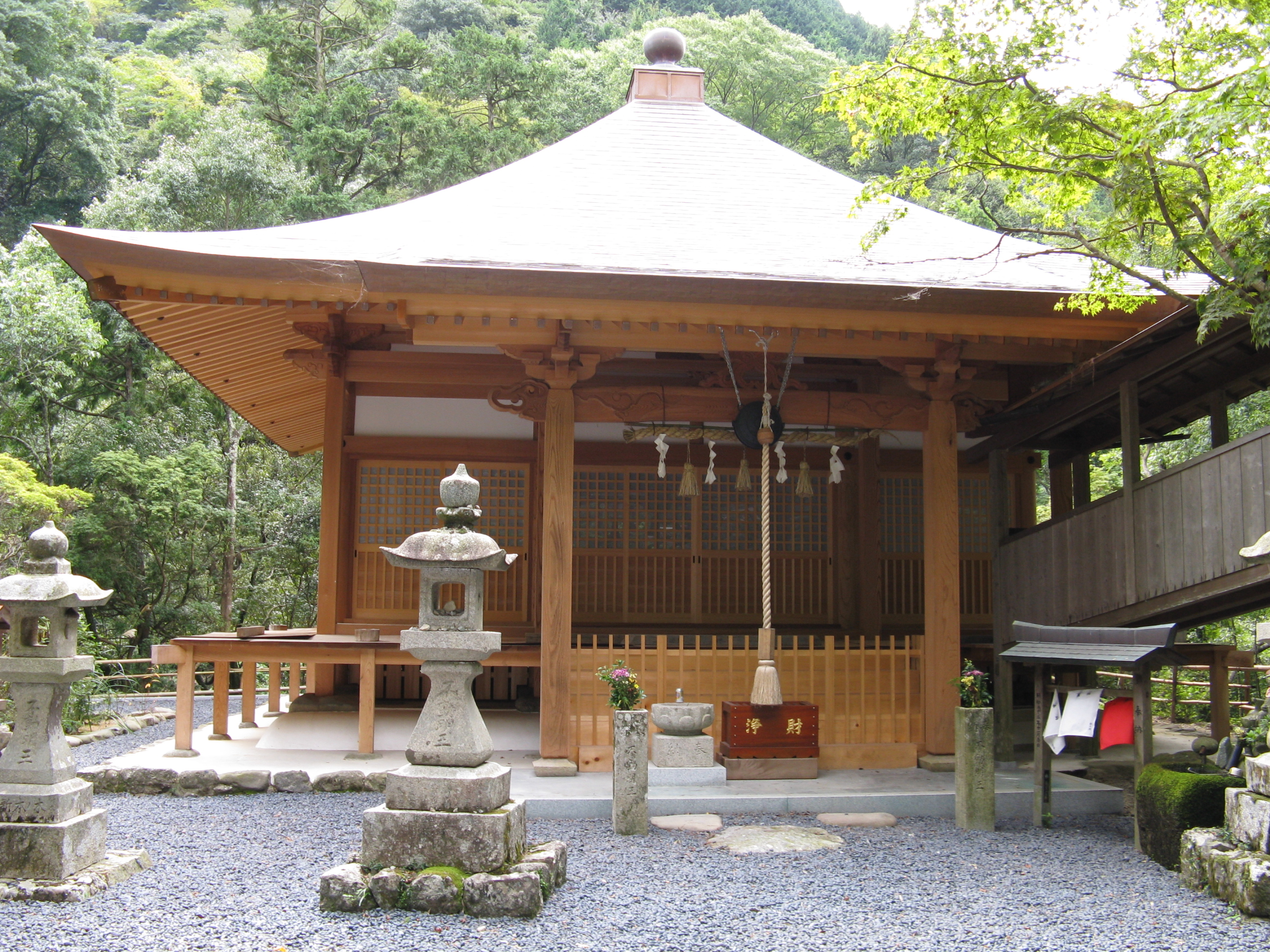 光滝寺 本堂